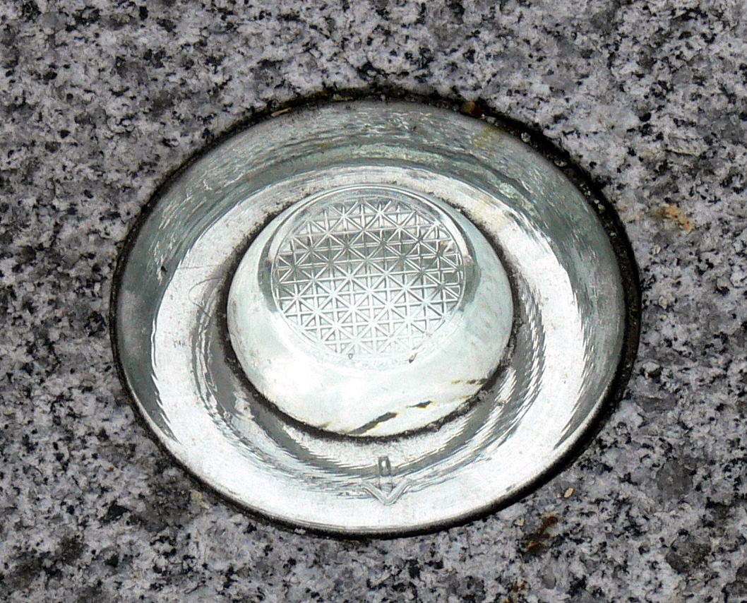 Ce dispositif de sécurité routière, inséré dans la chaussée, une bordure de trottoir ou de rond point.. est conçu pour renvoyer la lumière vers son origine. Il est peu couteûx et très efficace, et contrairement aux lampadaires, ne nécessite pas de source d'énergie. Photographie prise à lille, en 2006, par F Lamiot, mise à disposition sous licence CC-BY-SA.